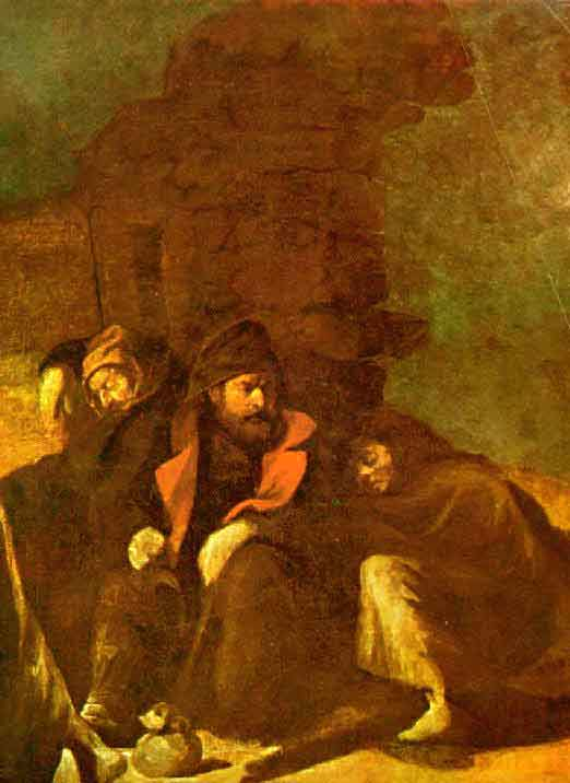 Ђура Јакшић, Ноћна стража (уље на платну). Слика је посвећена јаворским јунацима из српско-турског рата 1876—1878. године